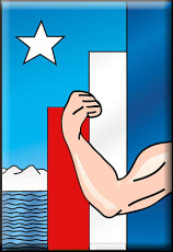 Emblema utilizado por el Movimiento Nacional Socialista de Chile.